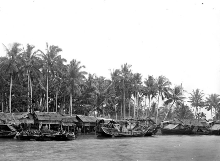 Negatief. Monding van de Edirivier aan de Oostkust van Aceh